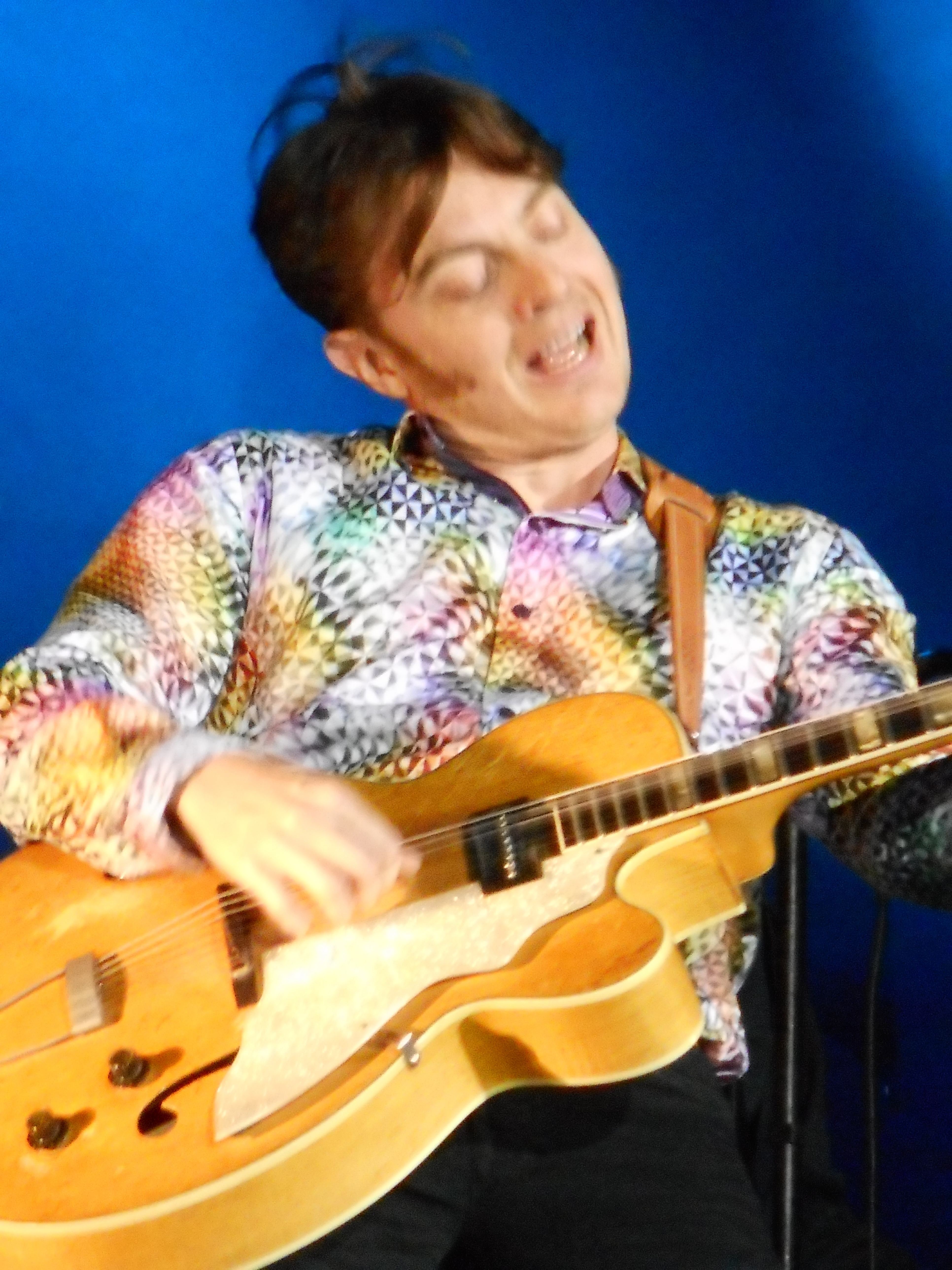 West Trainz, spectacle multi-média conçu par Erik West Millette, présenté à la place des Festival, le 9 juillet 2016, événement spécial de clôture du 37e Festival international de jazz de Montréal